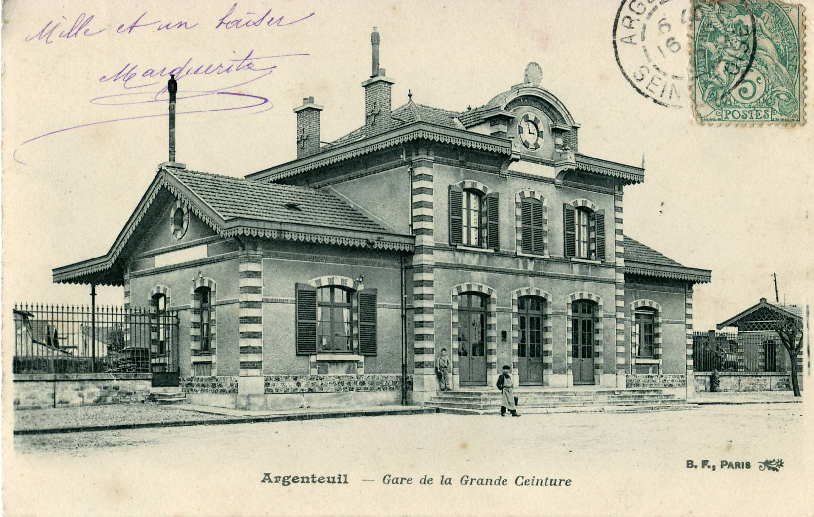 Carte postale ancienne éditée par BF à Paris : ARGENTEUIL : la gare de Grande Ceinture